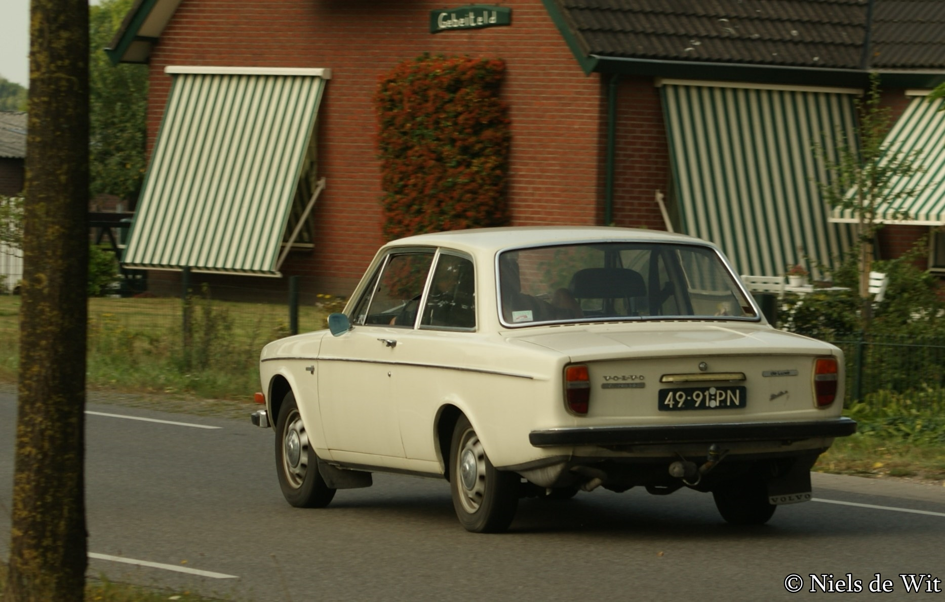 49-91-PN